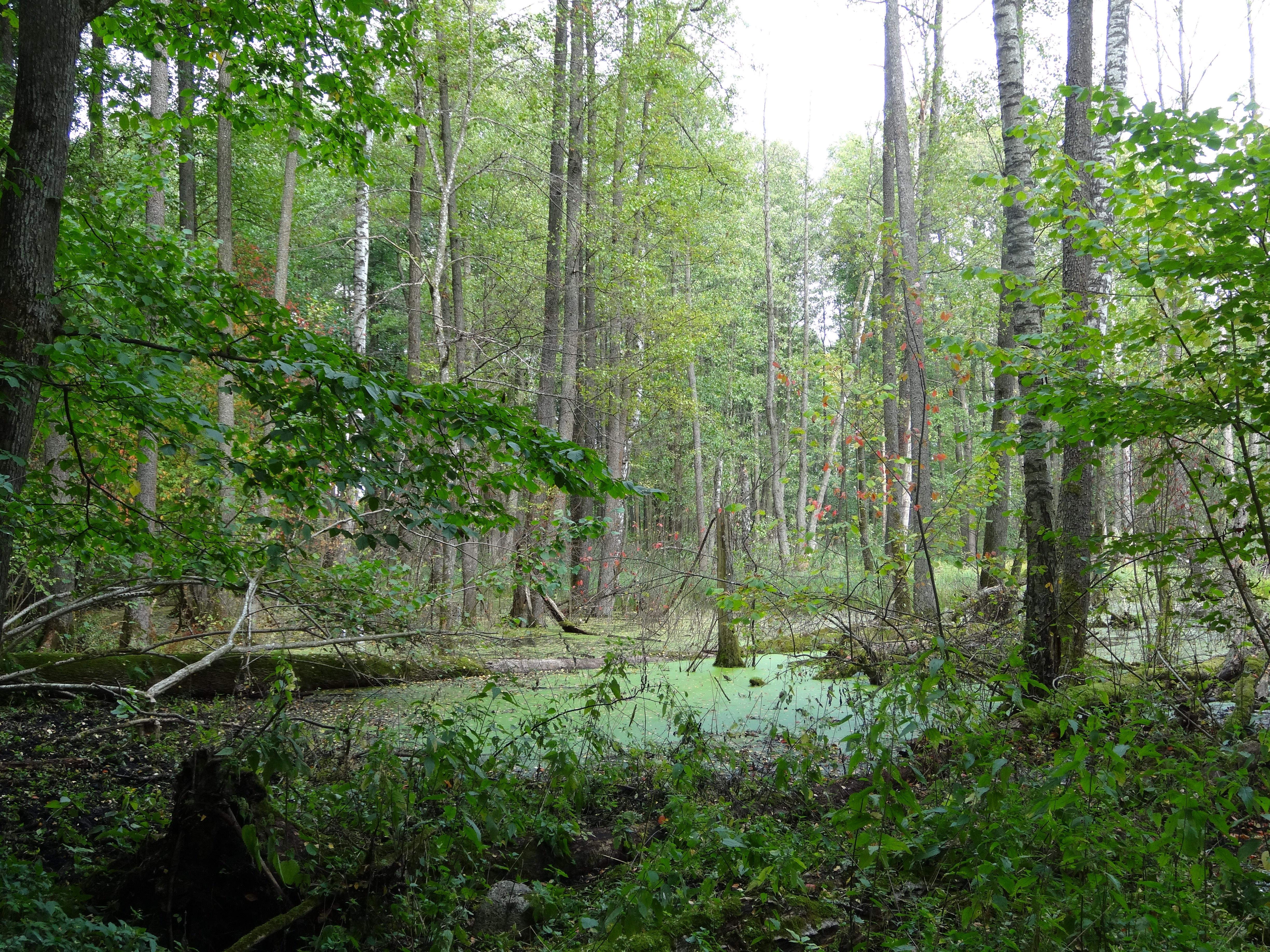 Rozlewisko koło drogi do Leśniczówki Rostek